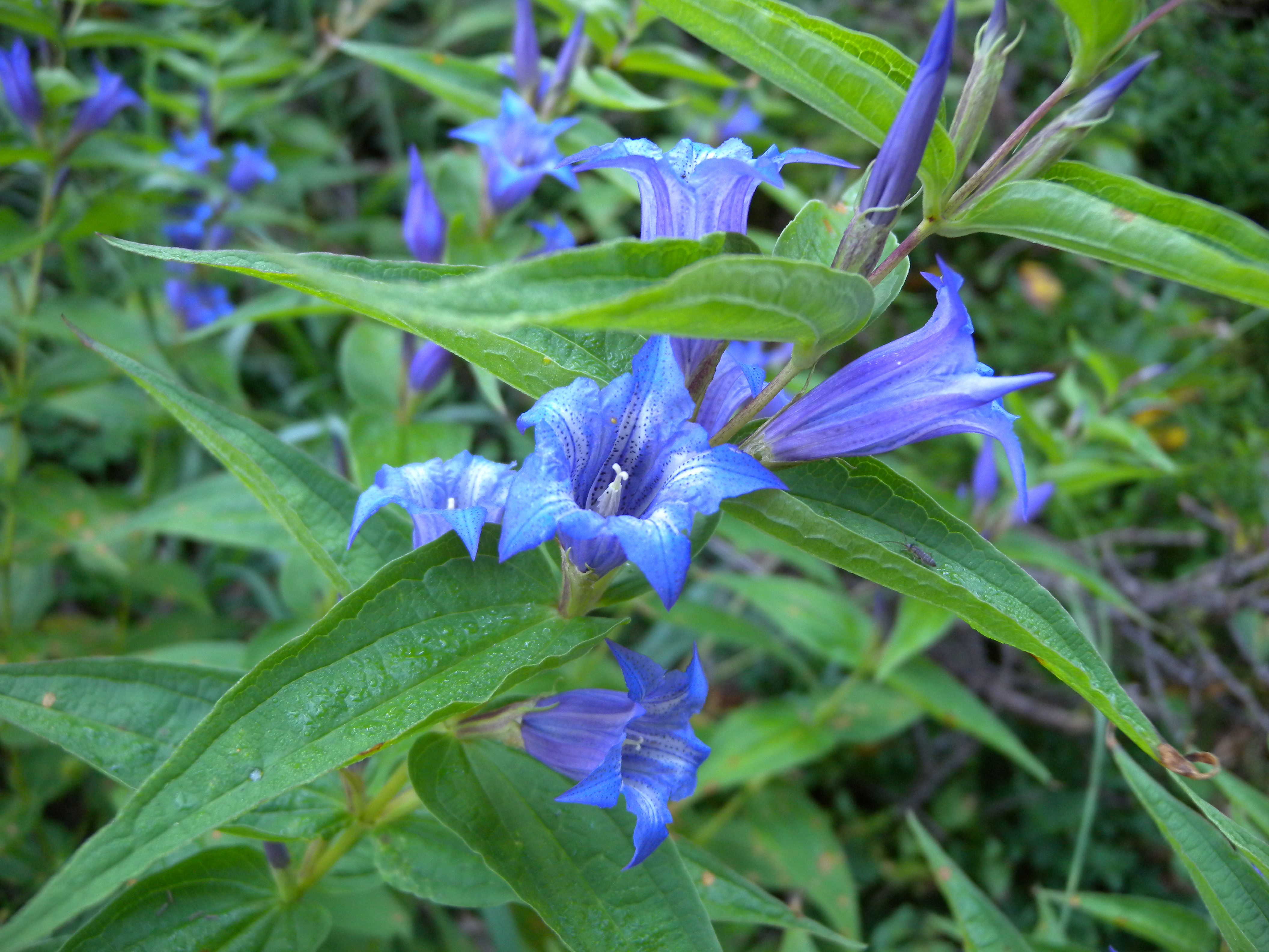 Gentiane à feuiles d'asclépiade Gentiana asclepiadea